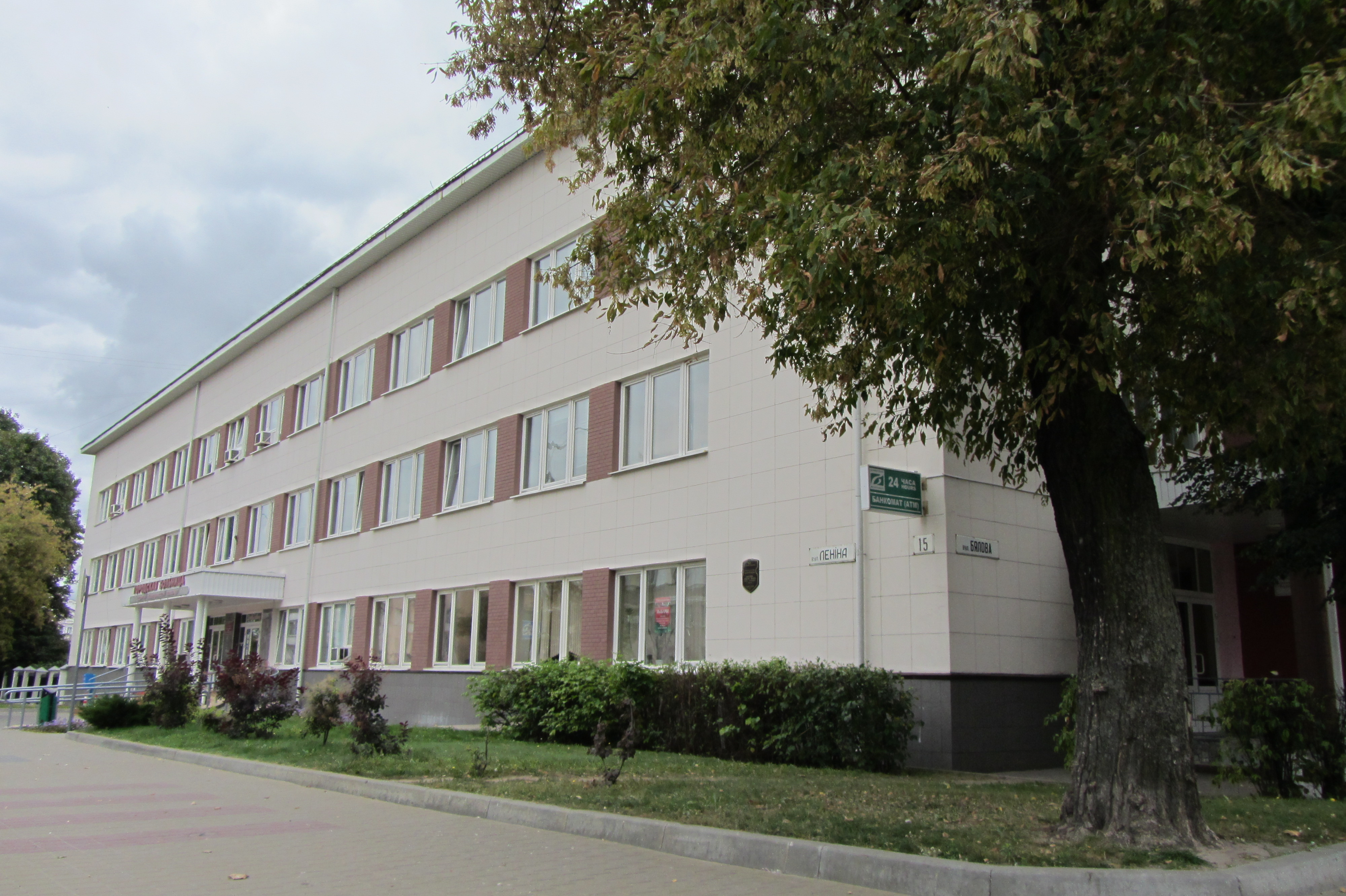 Беларуская (тарашкевіца): Забудова пл. Леніна. г. Берасьце This is a photo of Belarusian heritage monument. Reference number: 113Г000013 ( WLM)